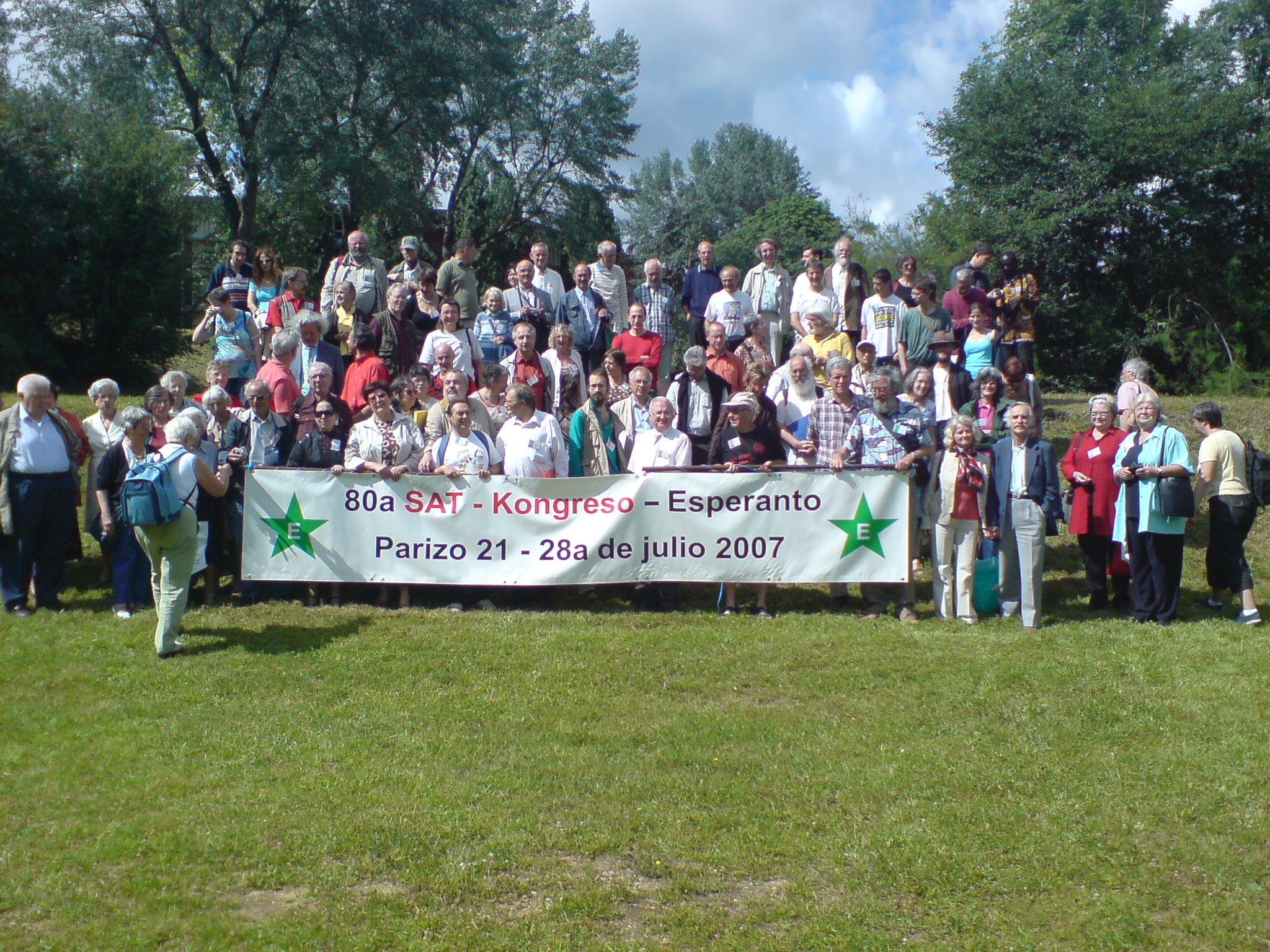 80-a kongreso de Sennacieca Asocio Tutmonda, Anthony, Francio, 200780ème Congrès de l'Association mondiale anationale, à Anthony, France, 2007